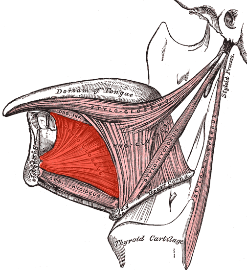 Genioglossus muscle